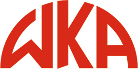 WKA.jpg